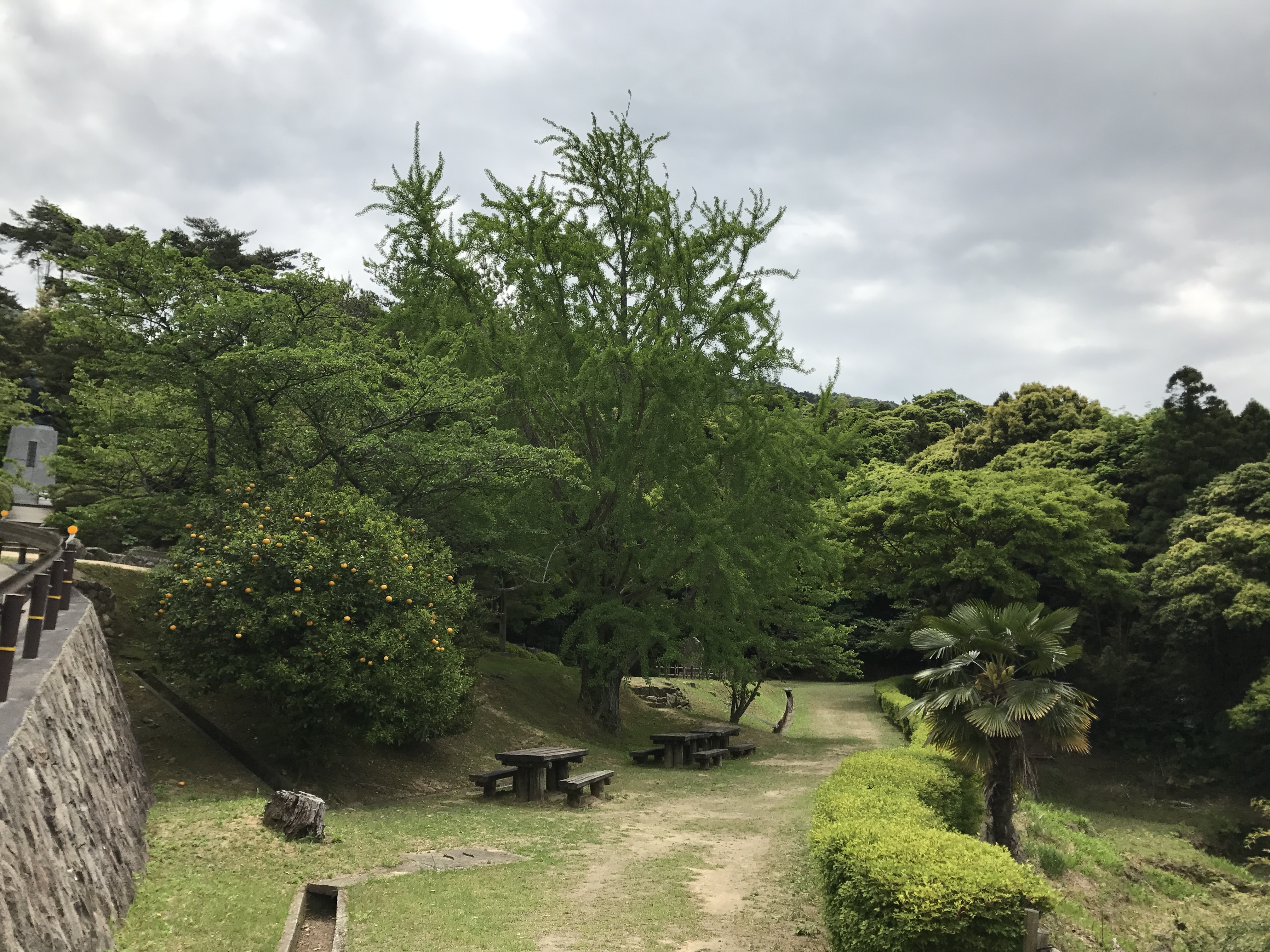 吉田松陰誕生地